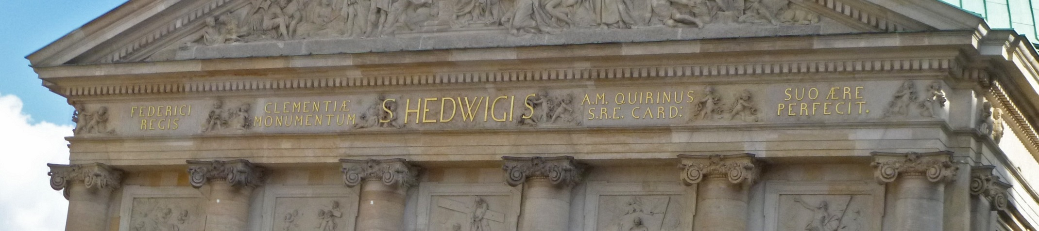 Berlin, Hedwigskathedrale, Giebelinschrift: FEDERICI REGIS CLEMENTIAE MONUMENTUM S(anctae) HEDWIGI S(acrum) A.M. QUIRINUS S(anctae) R(omanae) E(cclesiae) CARD(inalis) SUO AERE PERFECIT - „Das der Güte des Königs Friedrich zu verdankende Denkmal, der heiligen Hedwig geweiht, hat der Kardinal der heiligen römischen Kirche Angelo Maria Quirini auf seine Kosten vollendet.“ [1]